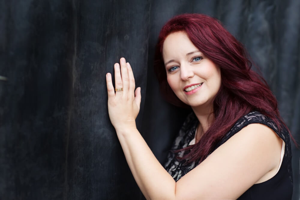 Poträt